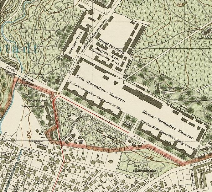 Auszug aus dem Plan der Albertstadt - 1917